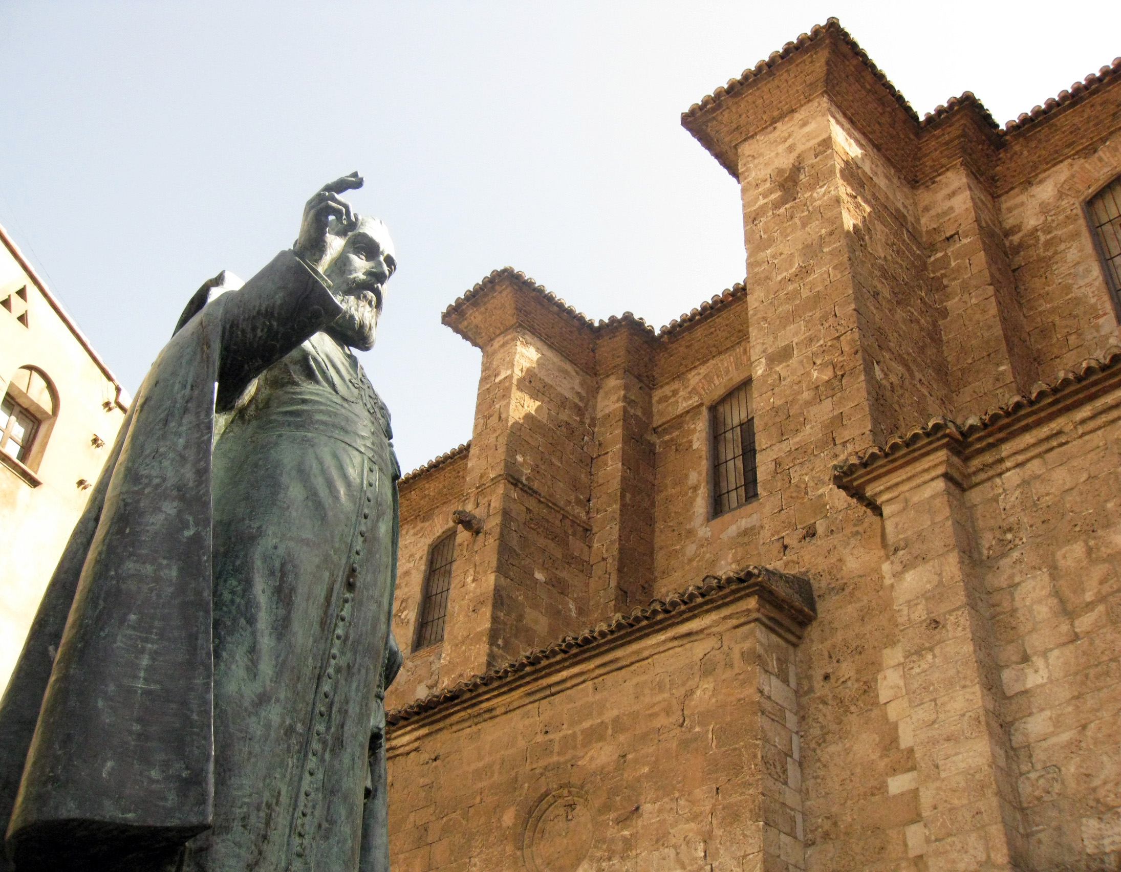 Monument_al_bisbe_Amigó_i_contraforts_de_la_Catedral_(Sogorb)